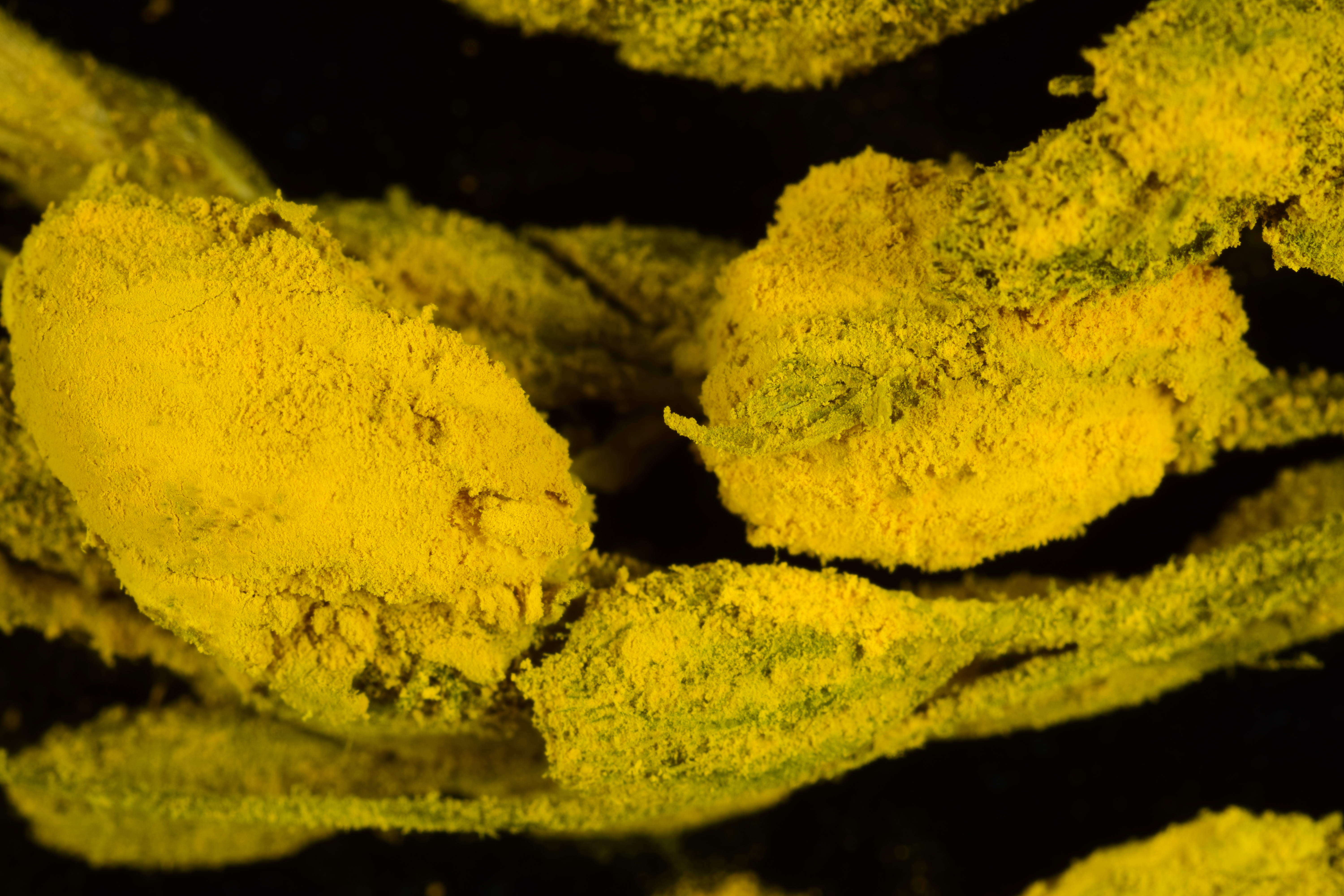 被稻麴病菌感染的穀粒，表面的黃色粉狀物為病原菌之厚膜孢子。